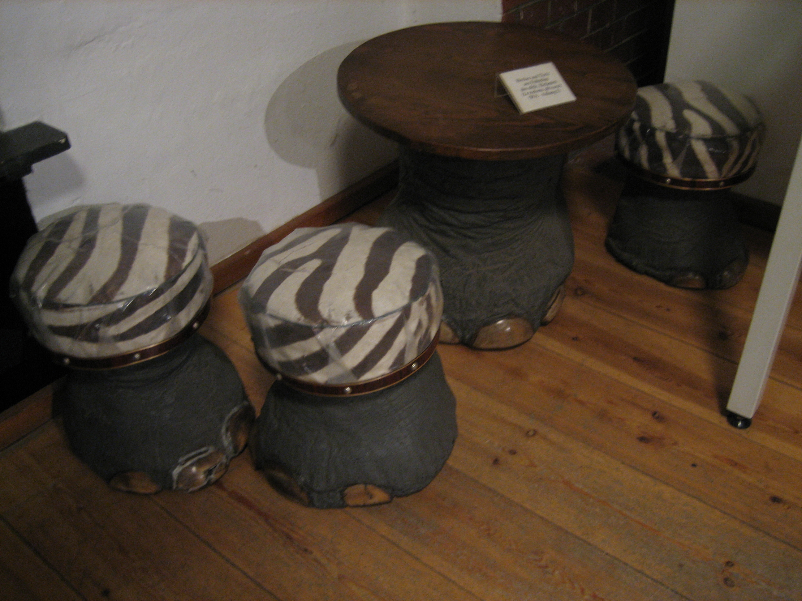 Elefantenfußschemel im Zollmuseum Hamburg (während der langen Nacht der Museen in Hamburg)